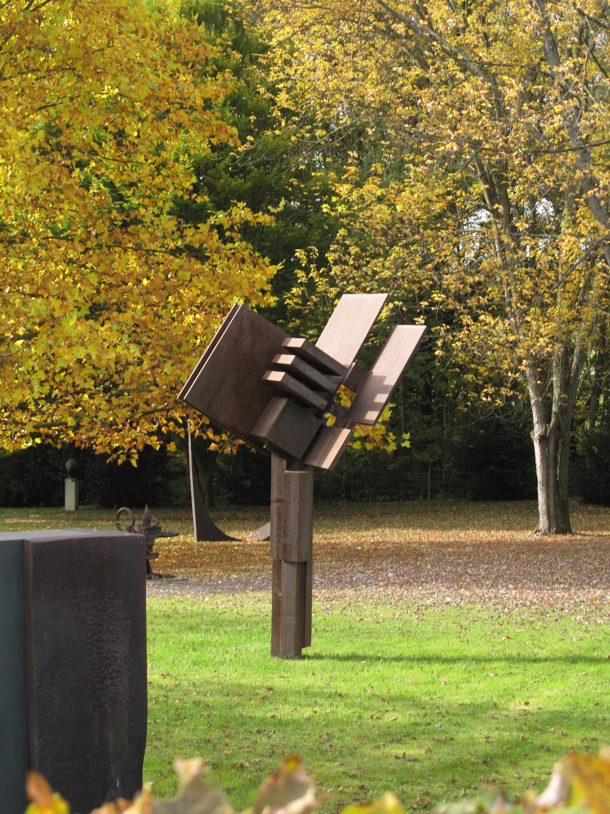 Max Schmitz, Skulptur o. d., 1977, - Deutschland, Baden-Württemberg, Nürtingen, vor dem Gebäude der Sammlung Domnick